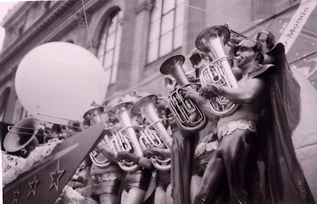 Concours de fanfares des Beaux-Arts 2005 - Fanfare Kosmonot des Beaux-Arts